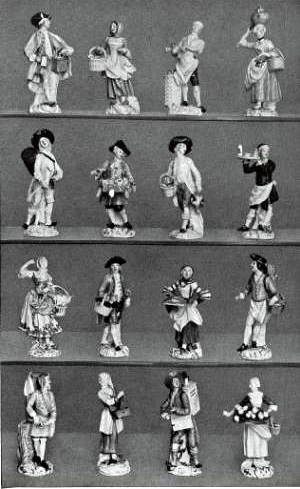 Meissen Porzellan Figuren aus dem ehemaligen Eigentum Emma Budge - als Raubkunst 1937 versteigert